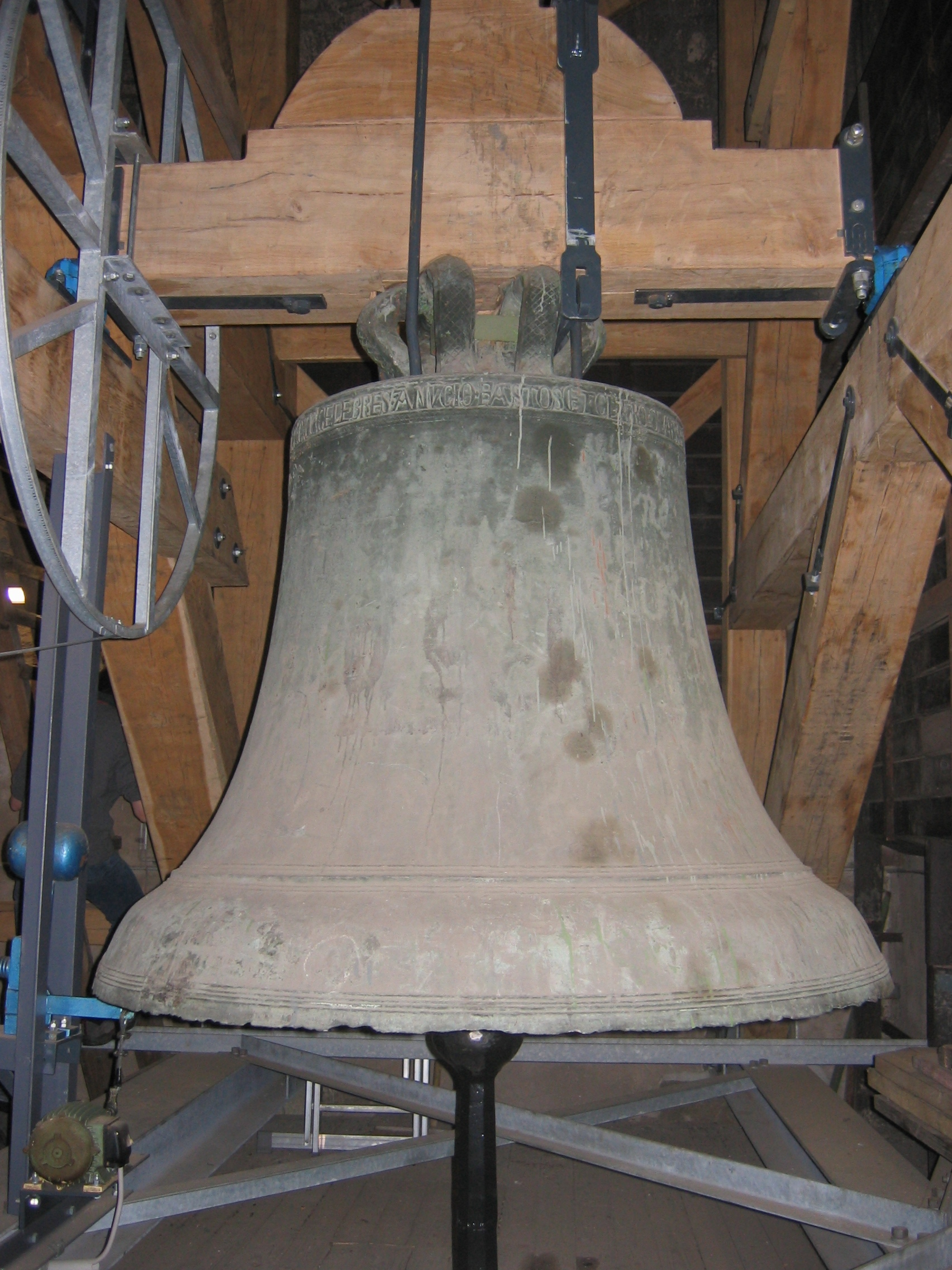 Salvatorglocke. St. Aposteln, Köln.